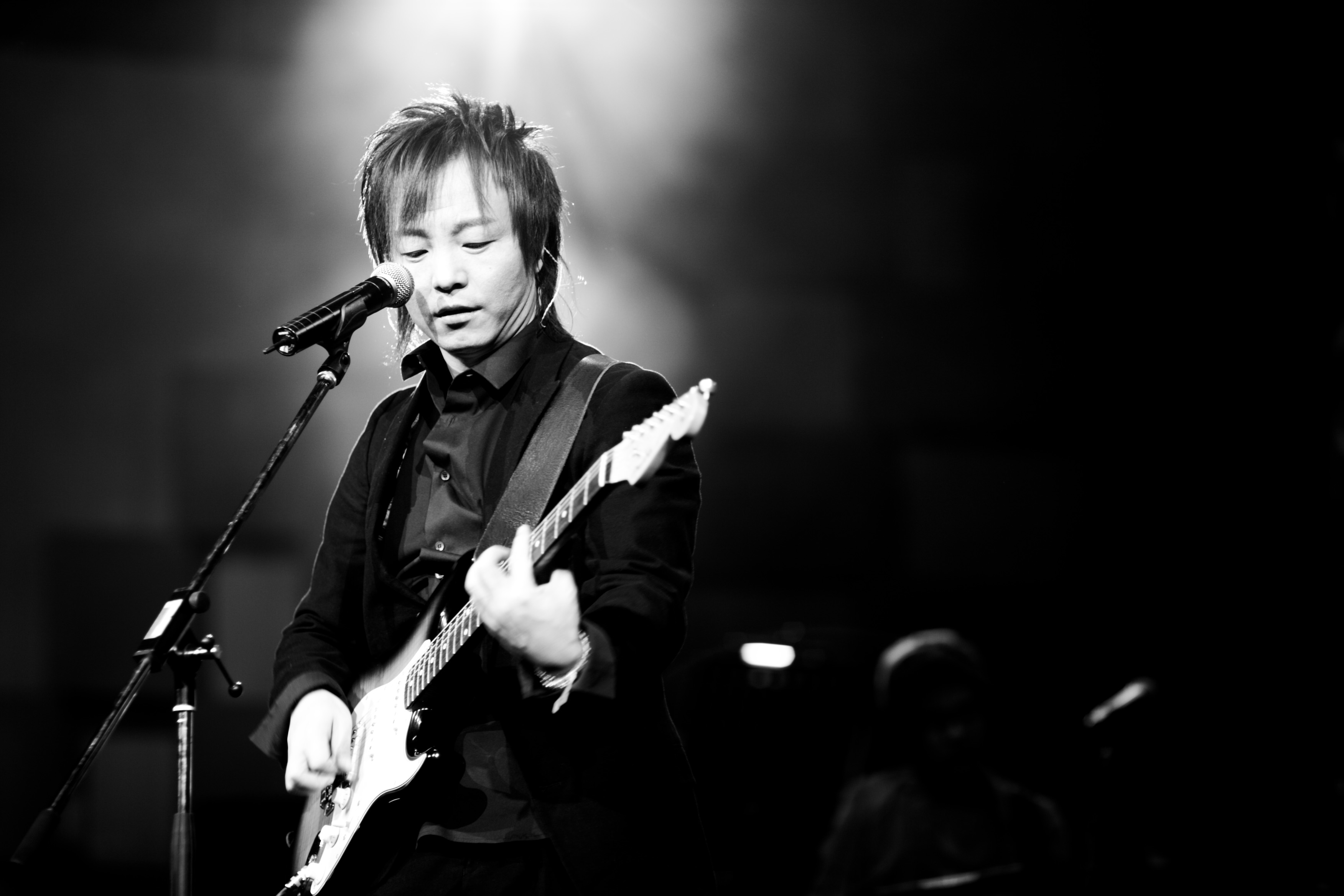 许巍在演唱会上。